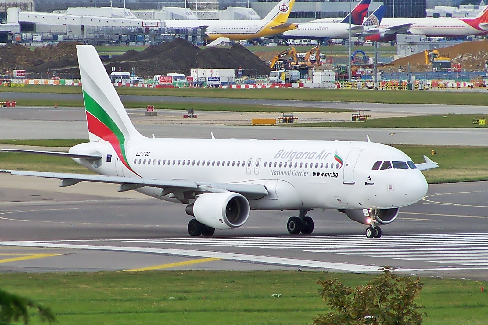 LZ-FBE A320 Bulgaria Air